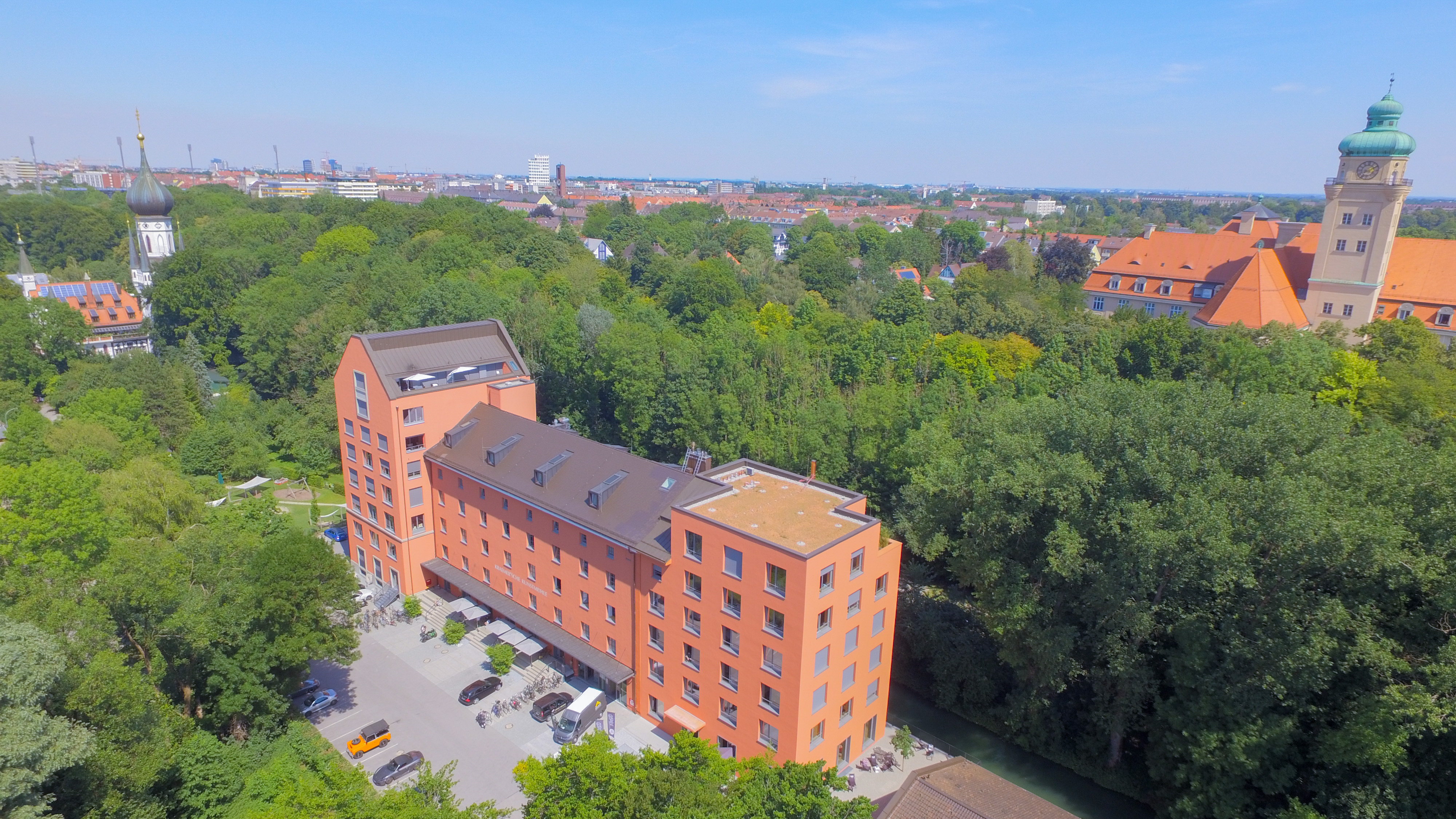 Luftbild Neubau mit Stadt